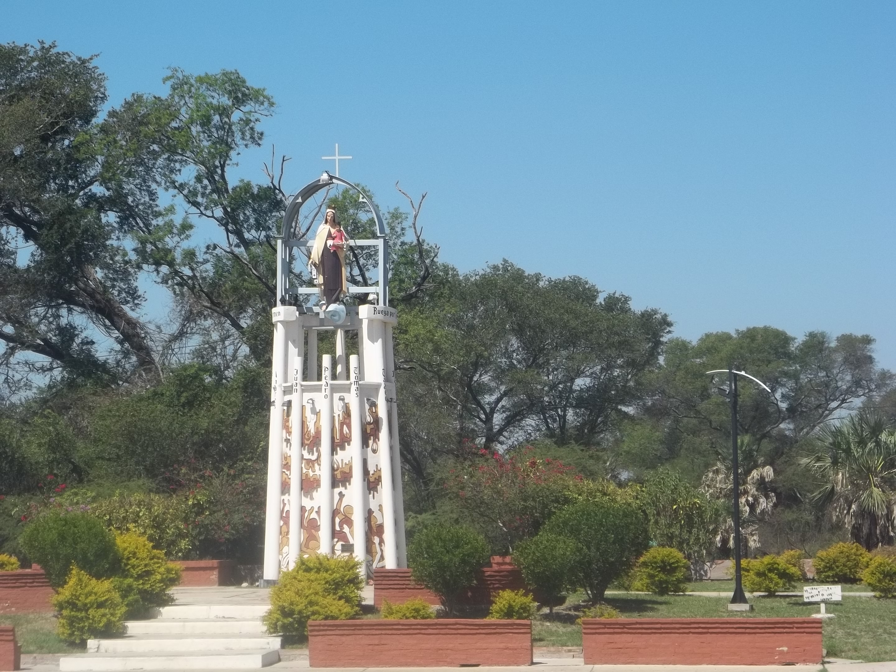 Oratorio dedicado a la Virgen del Carmen en Villa del Carmen, Formosa, Argentina